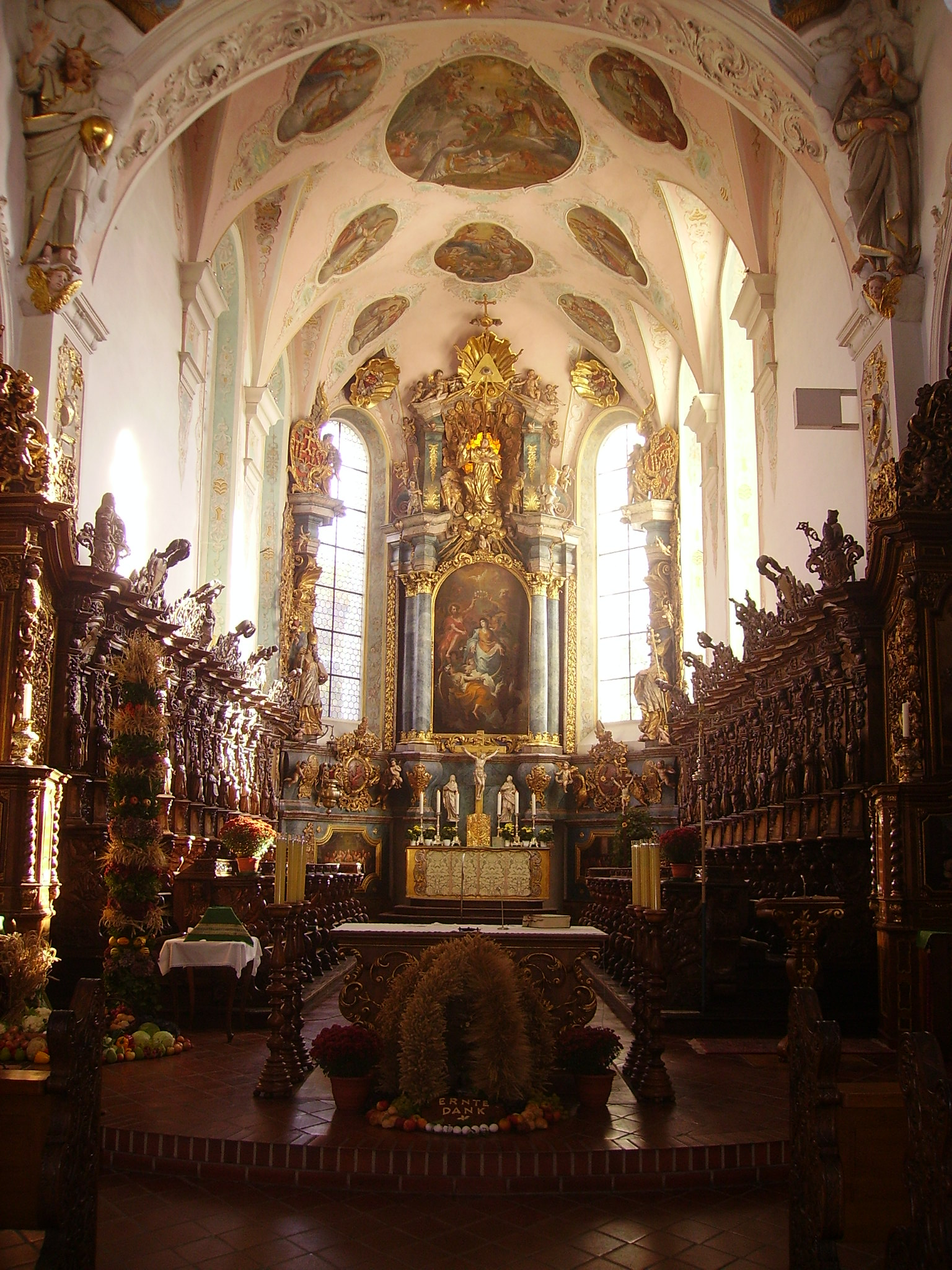 Chor der Klosterkirche St. Magnus des Klosters Schussenried, Bad Schussenried Unknown